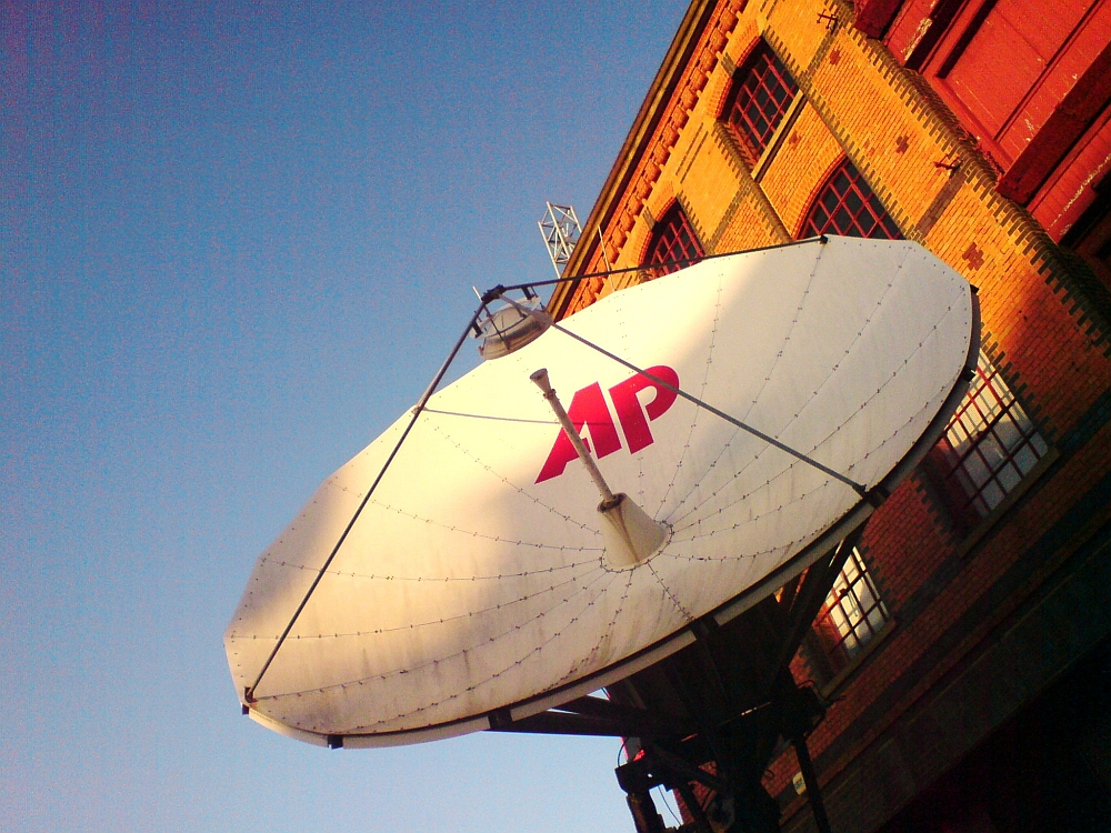 Satellitenschüssel vor der Zentrale des AP-Videodienstes APTN im Londoner Viertel Camden. In dem Backsteingebäude wurden früher Waren umgeschlagen. In das Untergeschoss konnten Kähne aus dem angrenzenden Regents-Kanal fahren. Das Haus nennt sich "The Interchange" und beherbergt zudem Studios mehrerer ausländischer Sender, wie z.B dem deutschen Sender RTL.